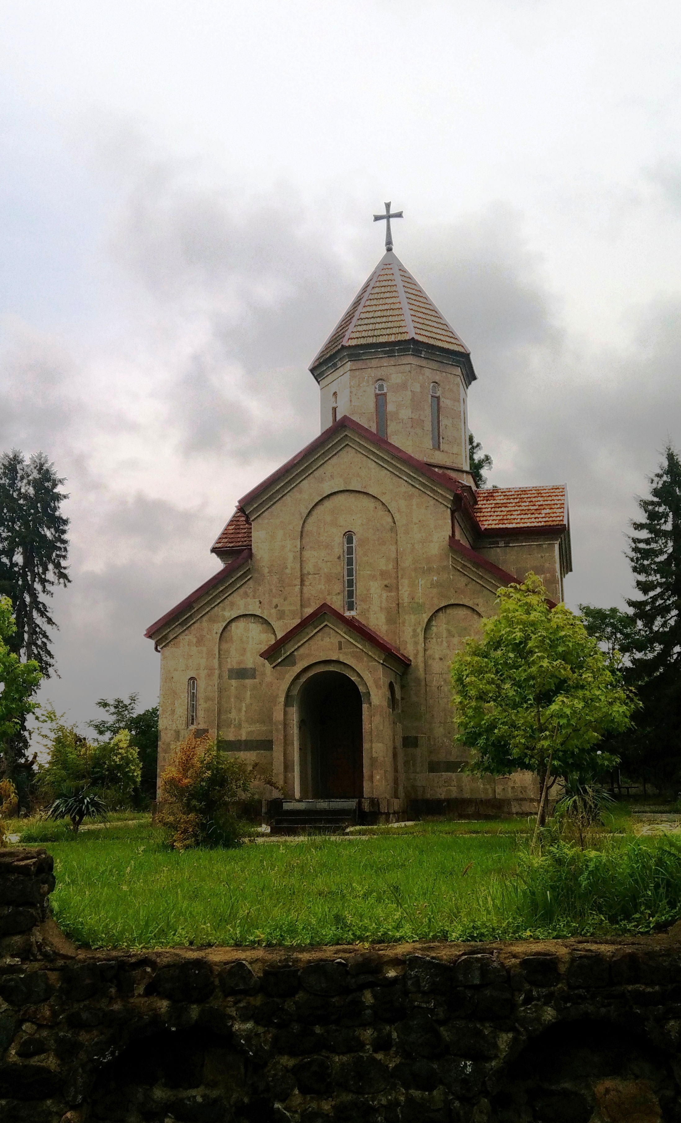 მაკვანეთის ეკლესია